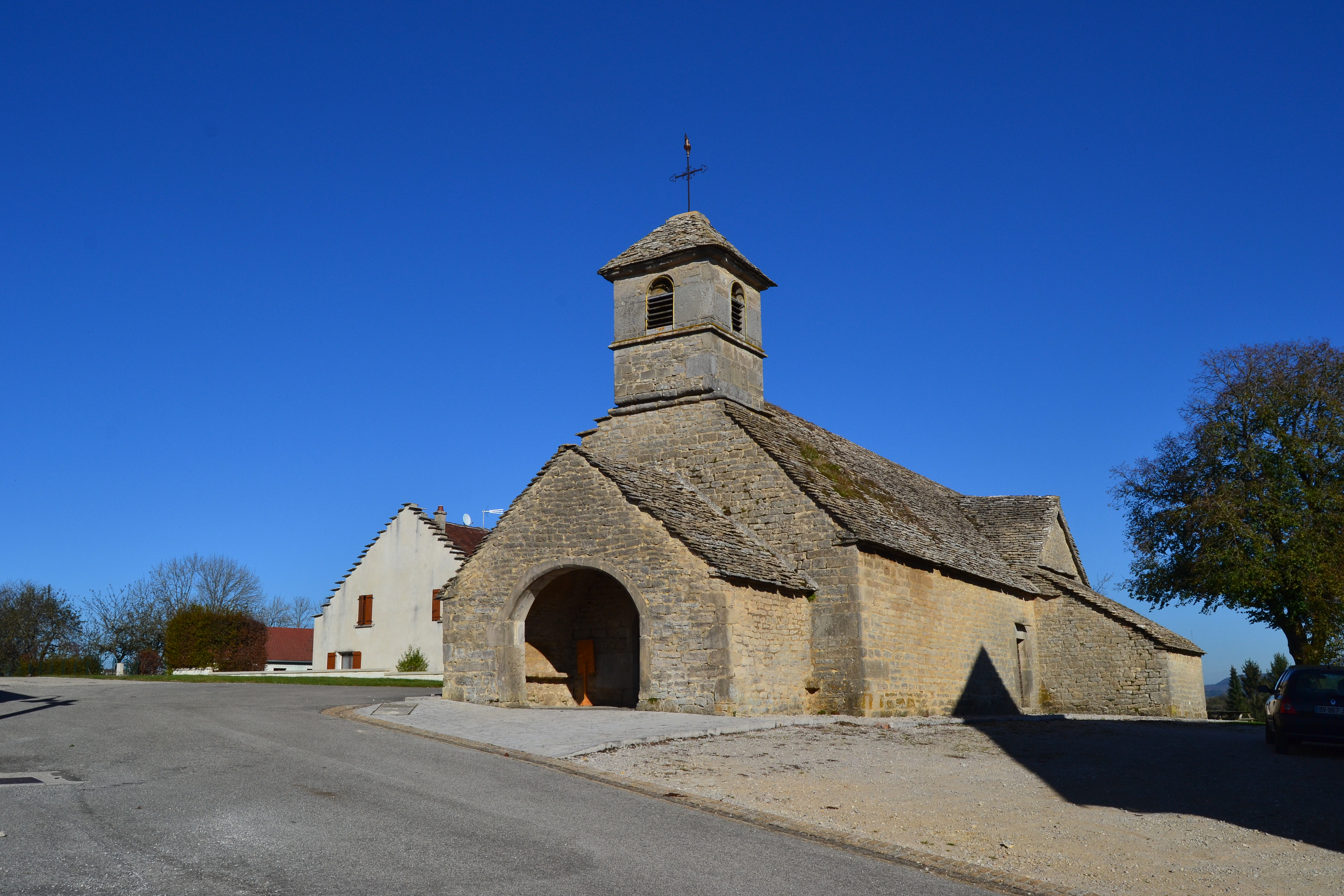 Église Saint-Jérôme de Briod (Jura)